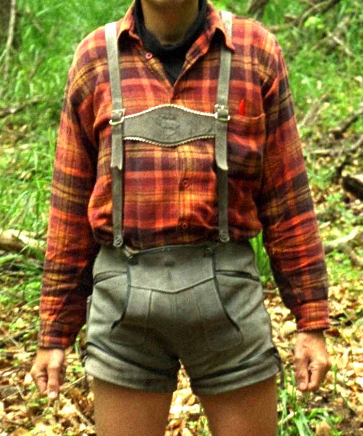 Traditionelle kurze Lederhose mit Latz zum Knöpfen und Stegträgern